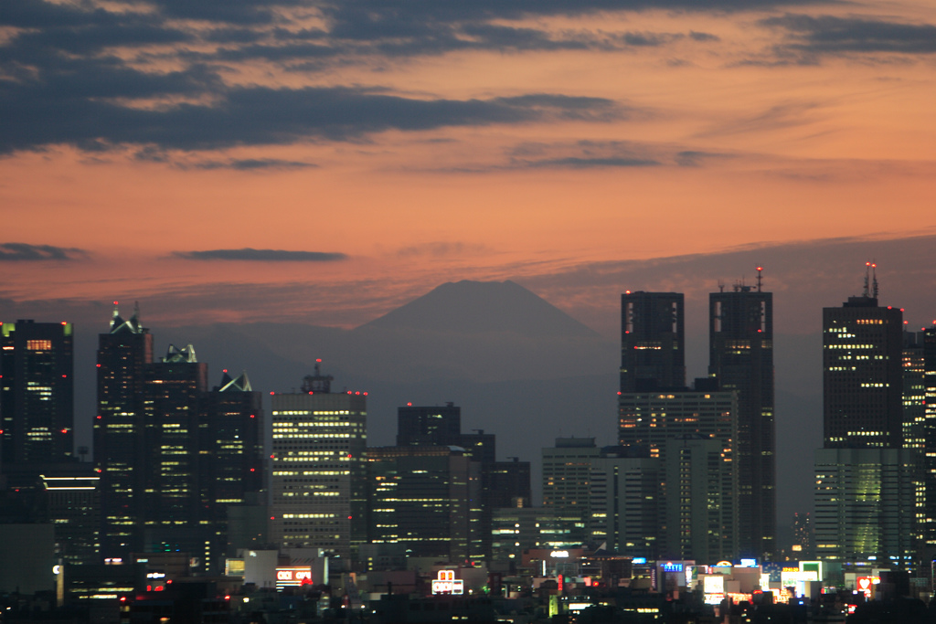 Shinjuku night view